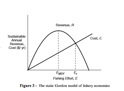 Description du bénéfice